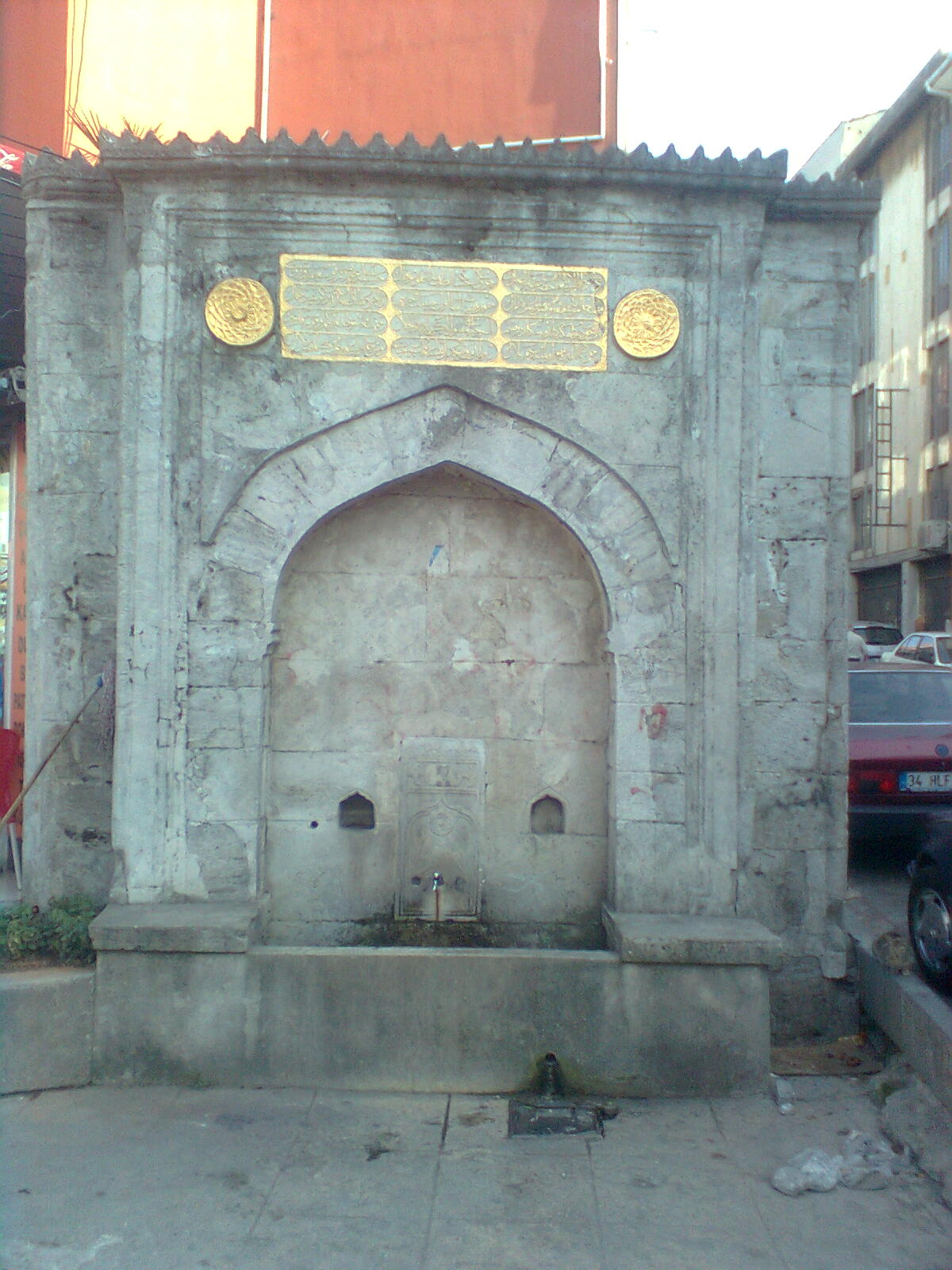 Abbas Ağa Çeşmesi veya Ağalar Başı Çeşmesi, Darüssaade Ağası Abbas Ağa tarafından 1670 yılında Üsküdar'da yaptırılan çeşme.